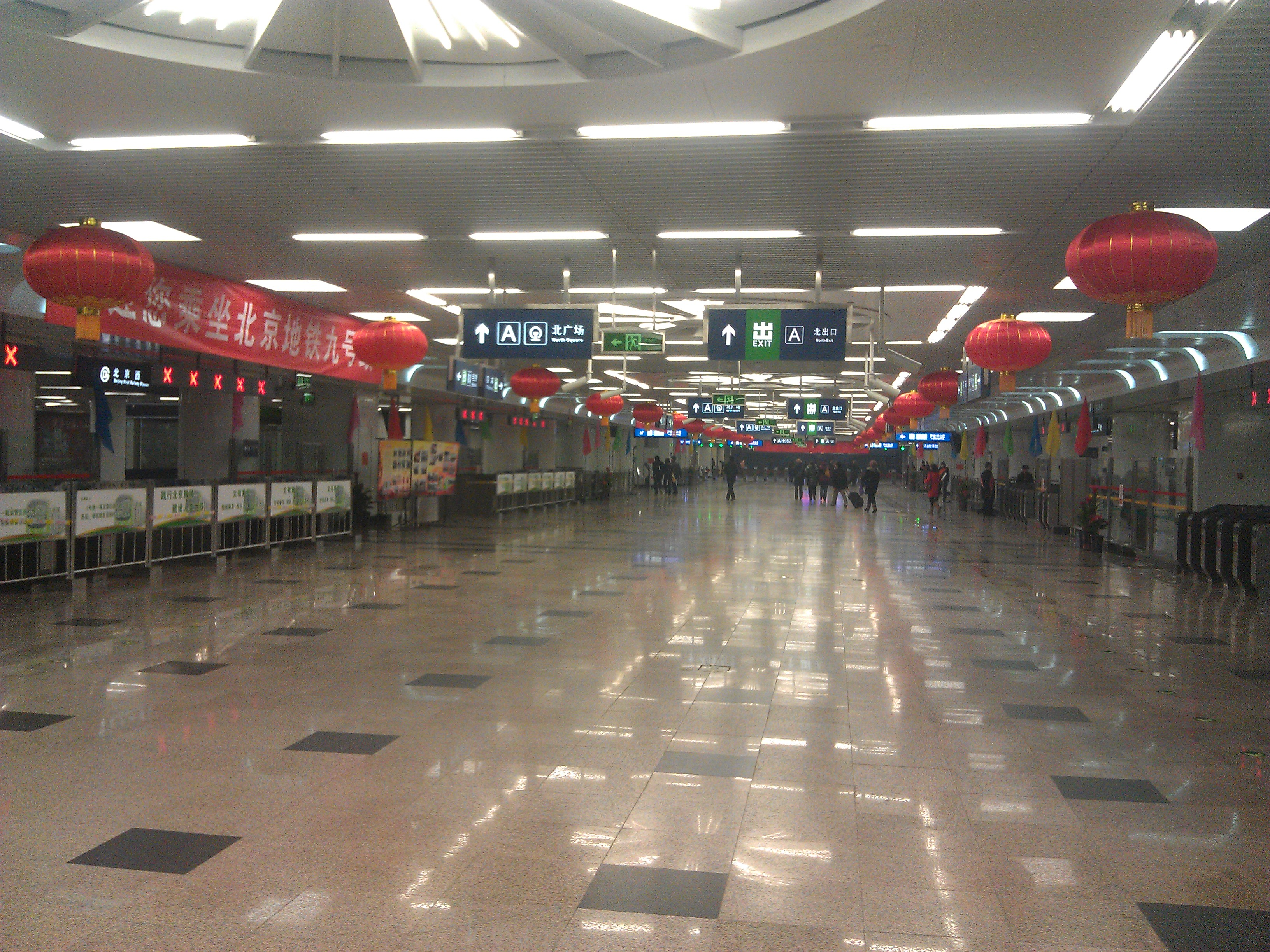 北京地铁北京西站站厅